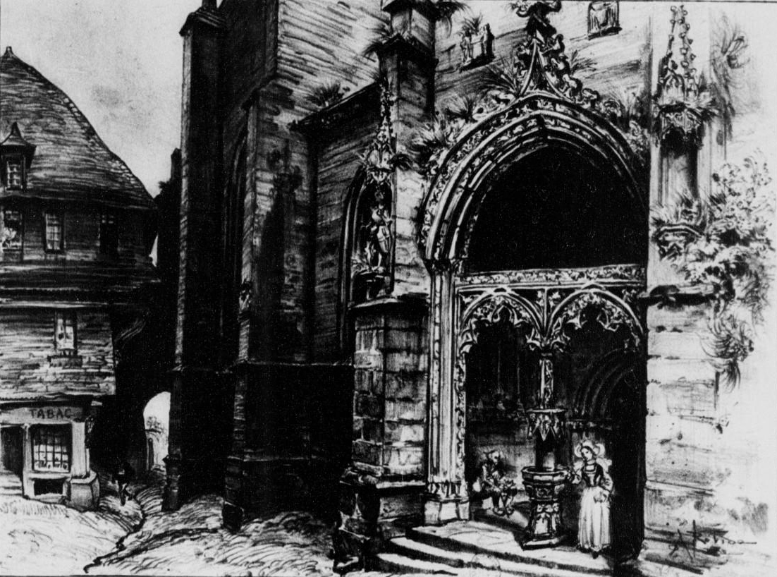 Le porche de l'église Notre-Dame-de-l'Assomption à Quimperlé (dénommée à tort église Saint-Michel par Albert Robida, lithographie d'Albert Robida publiée dans "La vieille France. Bretagne" vers 1900)